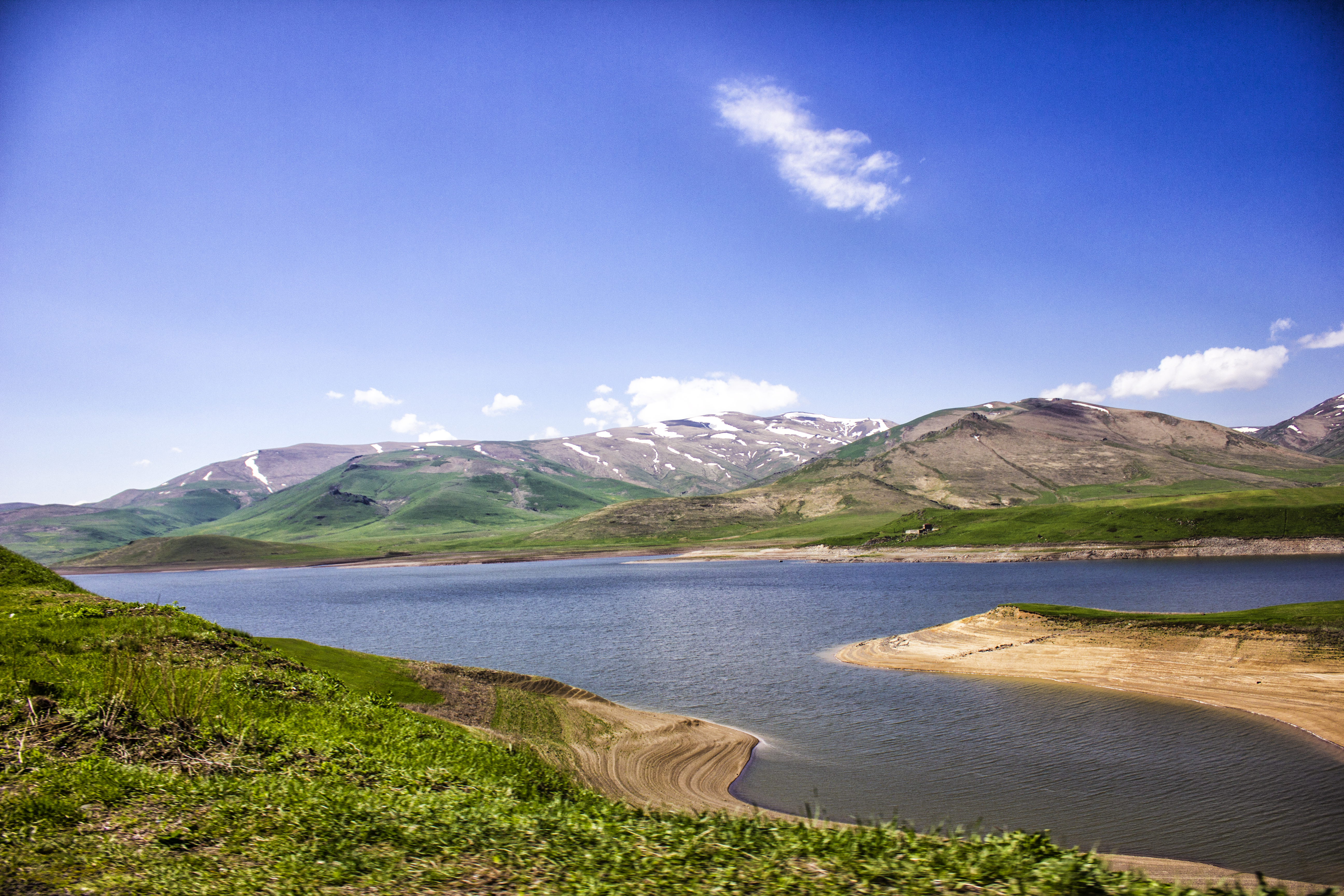 Սիսիանի Սպանդարյան ջրամբարը Վայքի լեռնաշղթայի ֆոնին